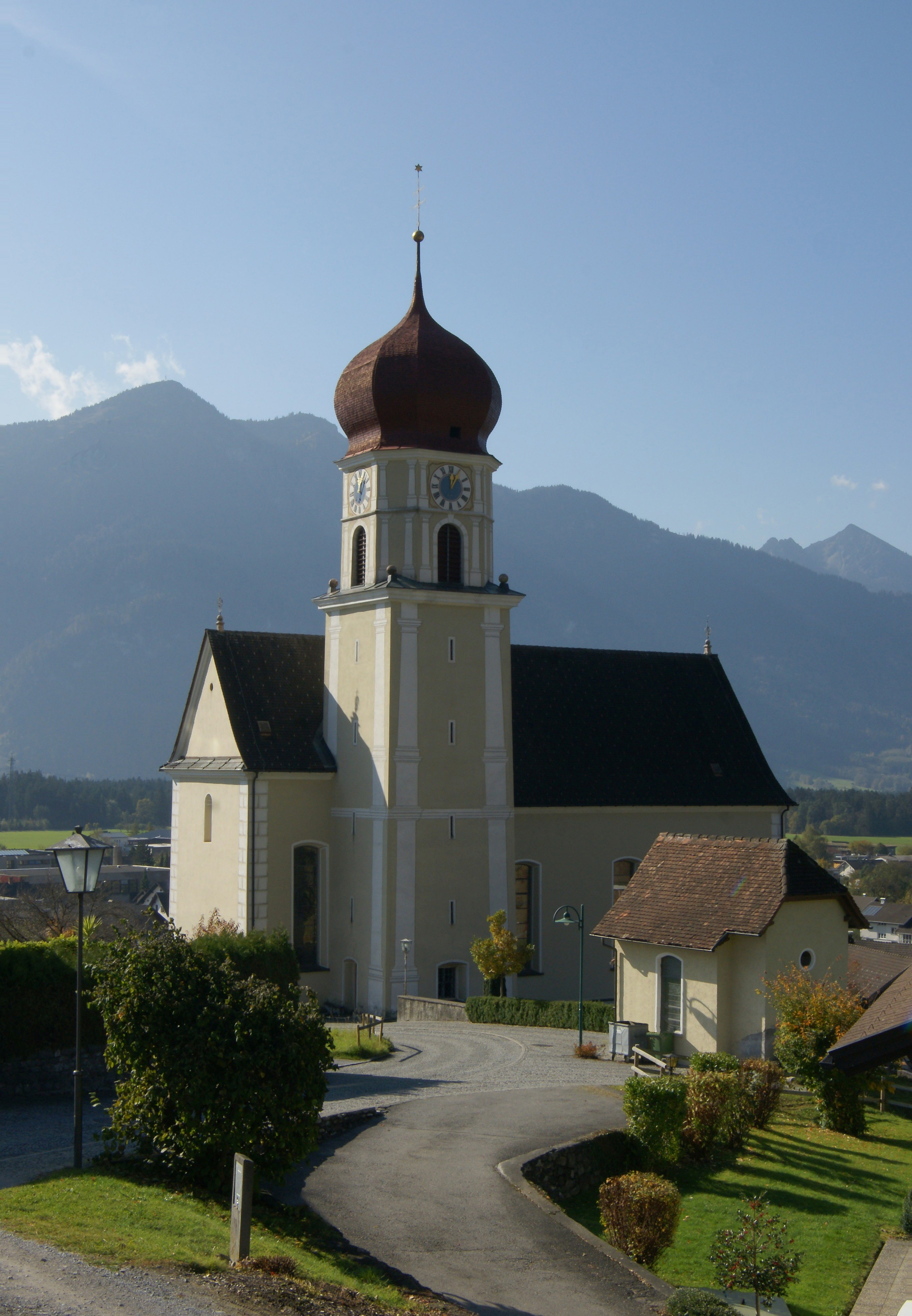 Pfarrkirche hl. Stephan in Thüringen in Vorarlberg. Lourdeskapelle